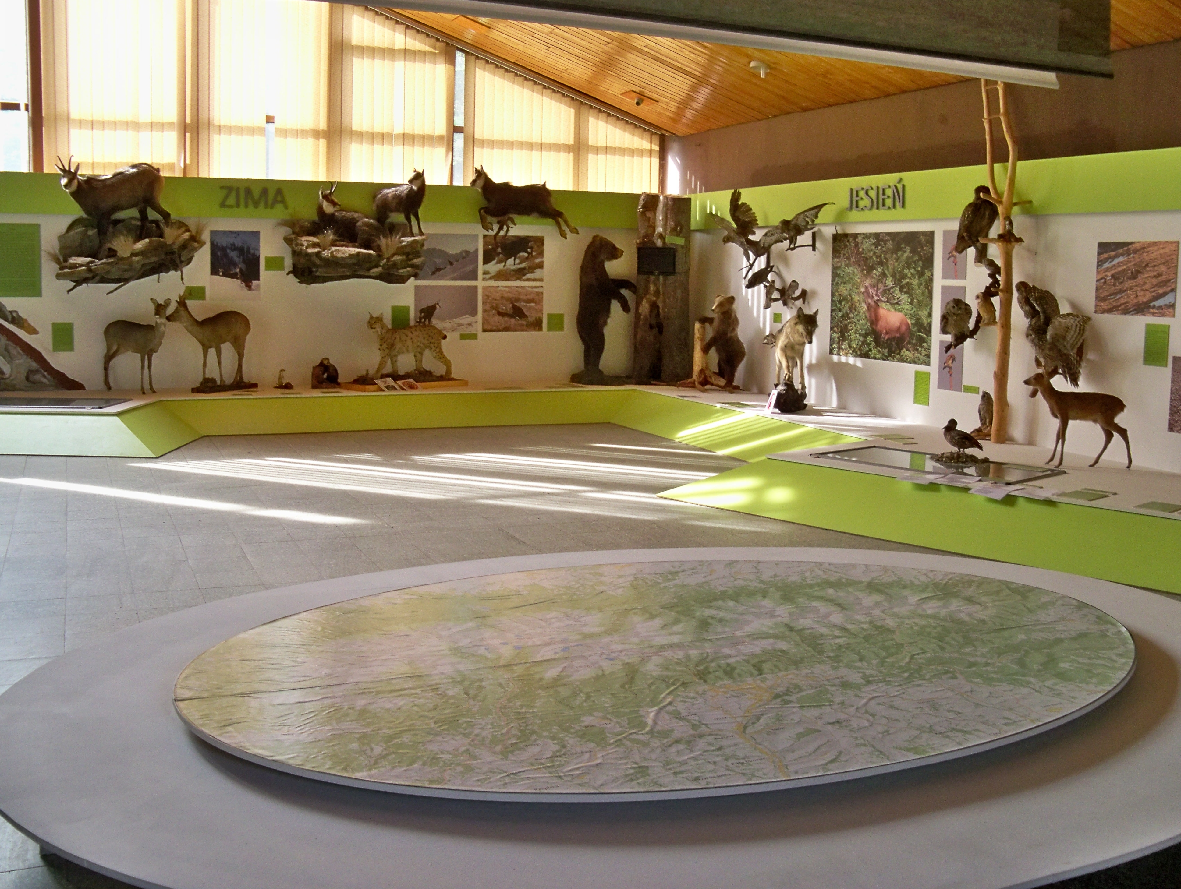 Centrum Edukacji Przyrodniczej TPN